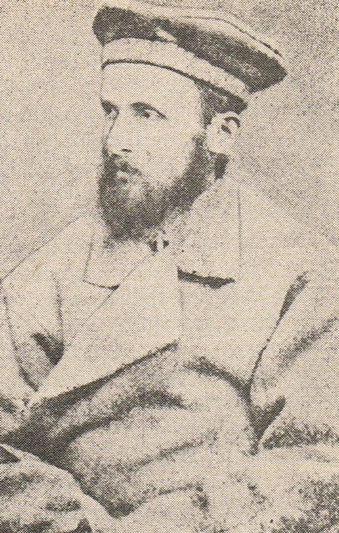 Mieczysław Mańkowski działacz PPS